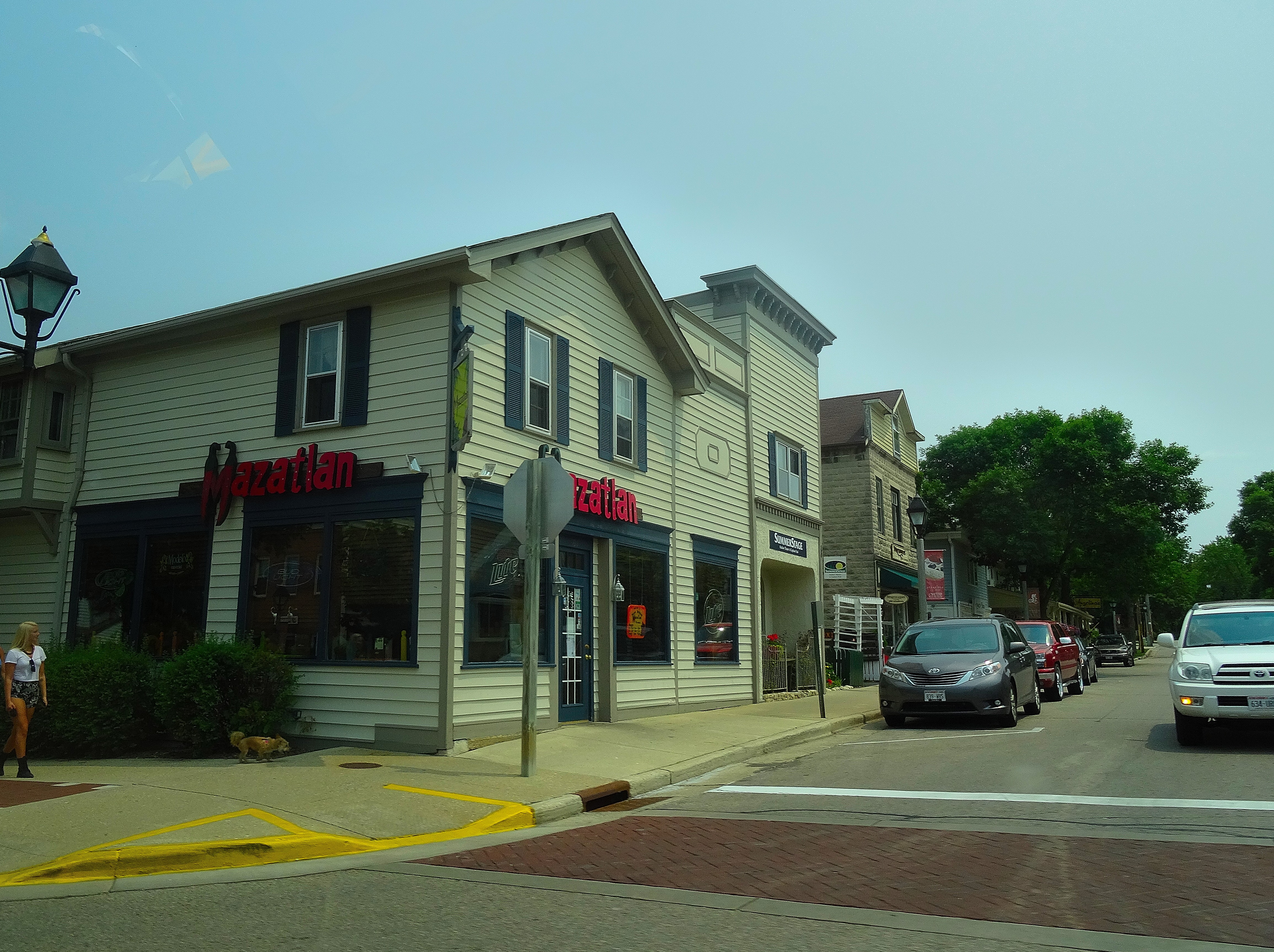 Mazatlan